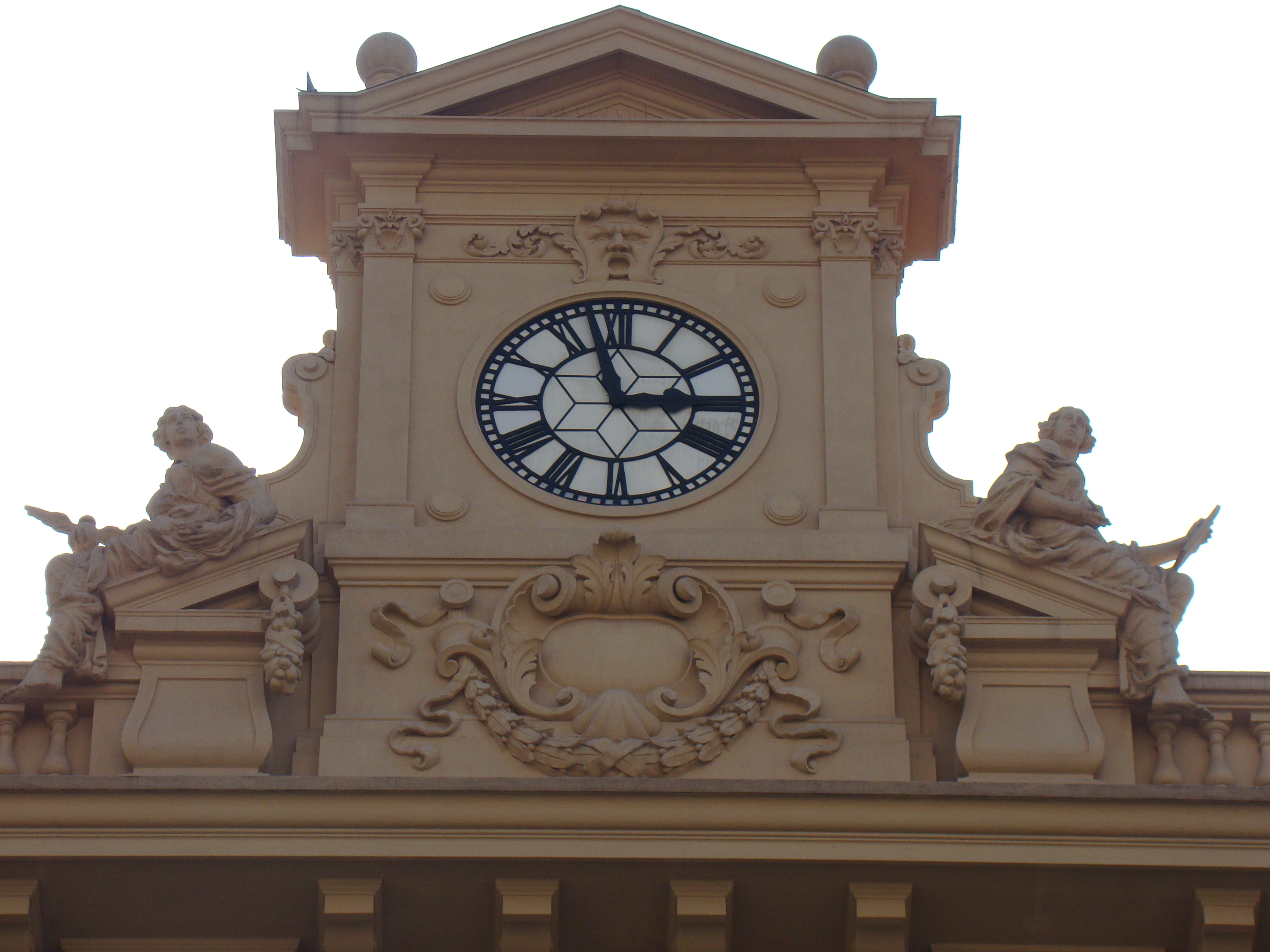 Detalhes do relógio na fachada do Palácio dos Correios, em São Paulo (SP), Brasil.